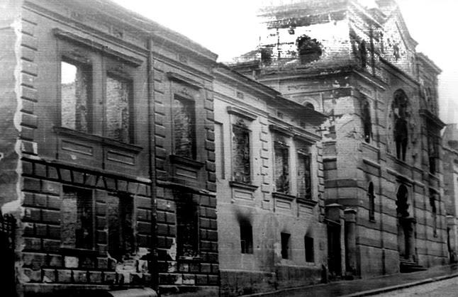 Фотографије бомбардованог Београда 06. 04. 1941. и улазак окупатора у Београд априла 1941.